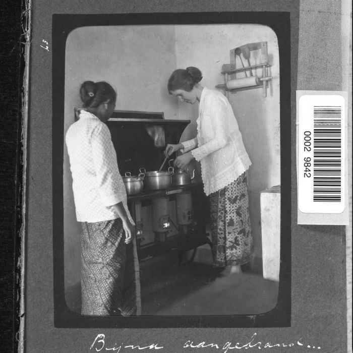 Foto. Vrouw met keukenmeid bij het fornuis